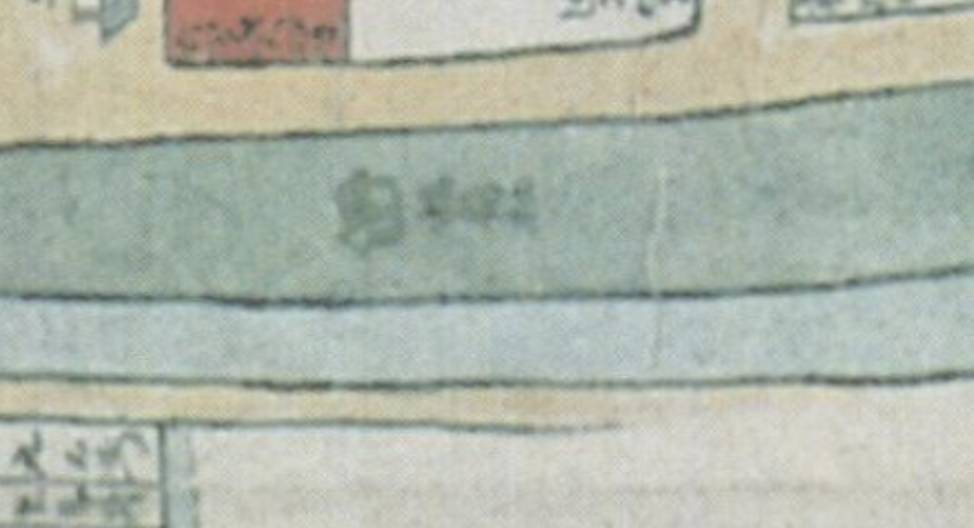 館林宵稲荷神社 嘉永年間の宵稲荷 嘉永元年館林城下地図より抜粋